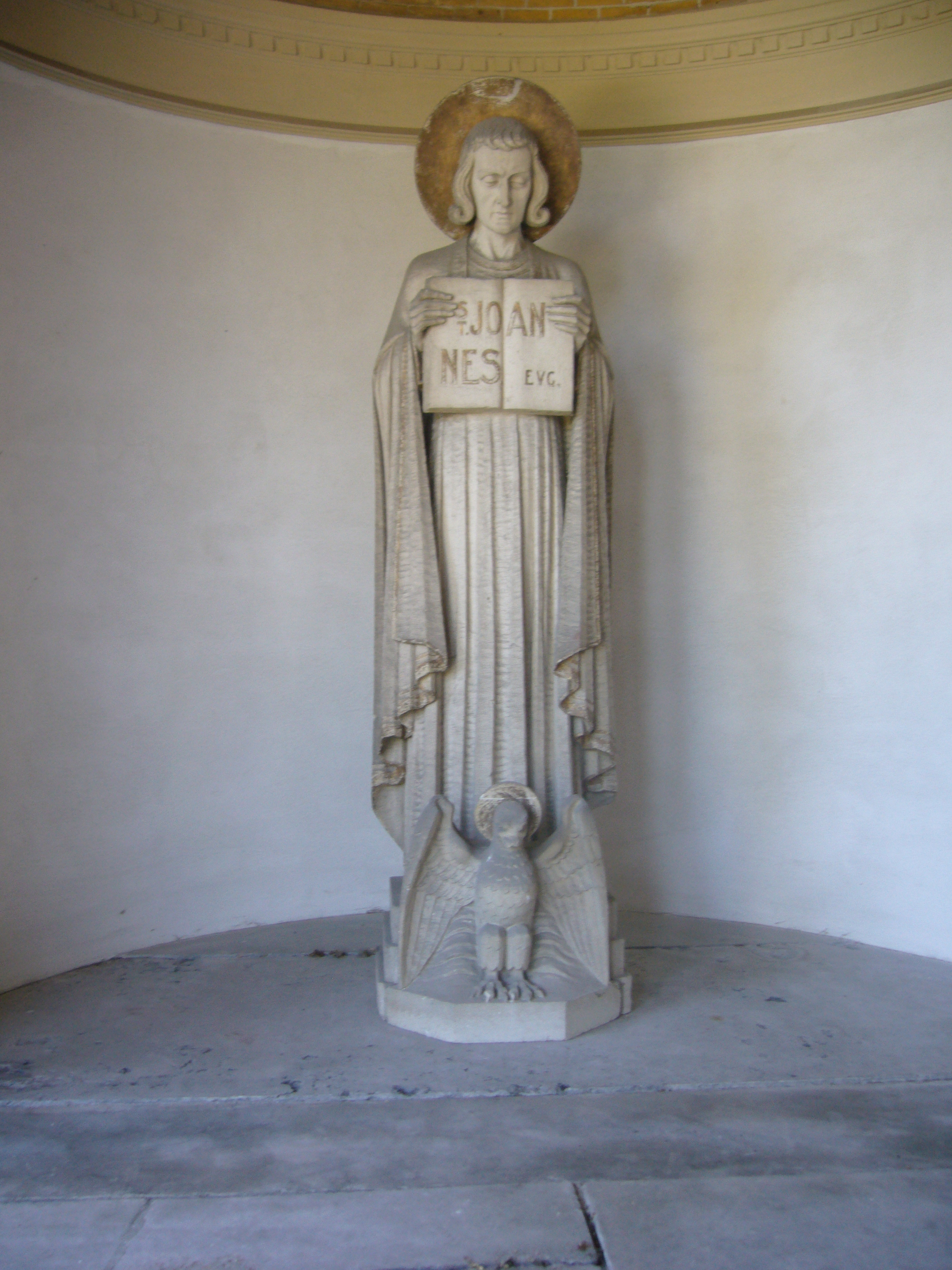 Apostel Johannes in de arcade van de begraafplaats St Petrus Banden in Den Haag